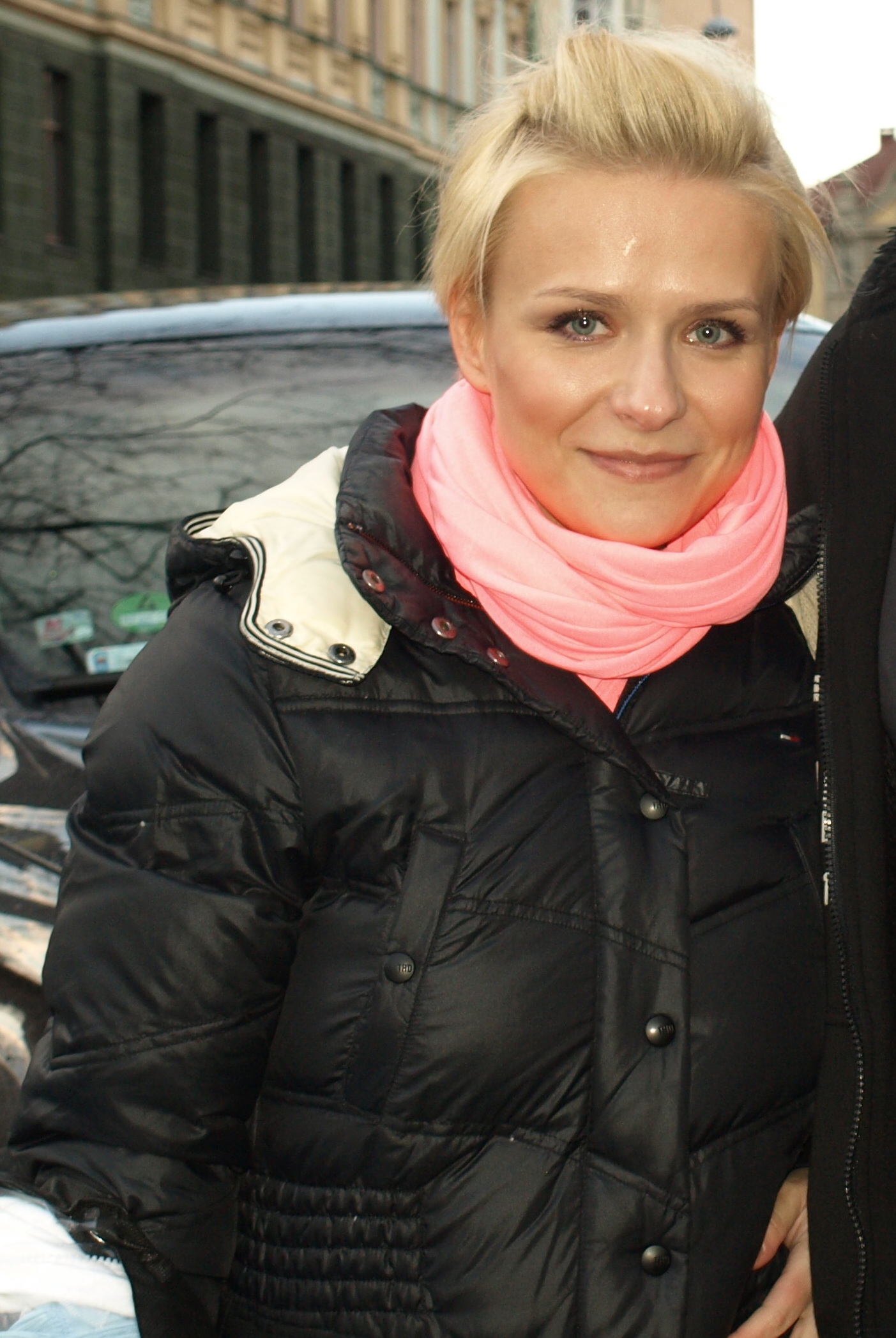 Aneta Zając w 2012 roku